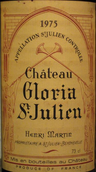 Château Gloria 1975 label